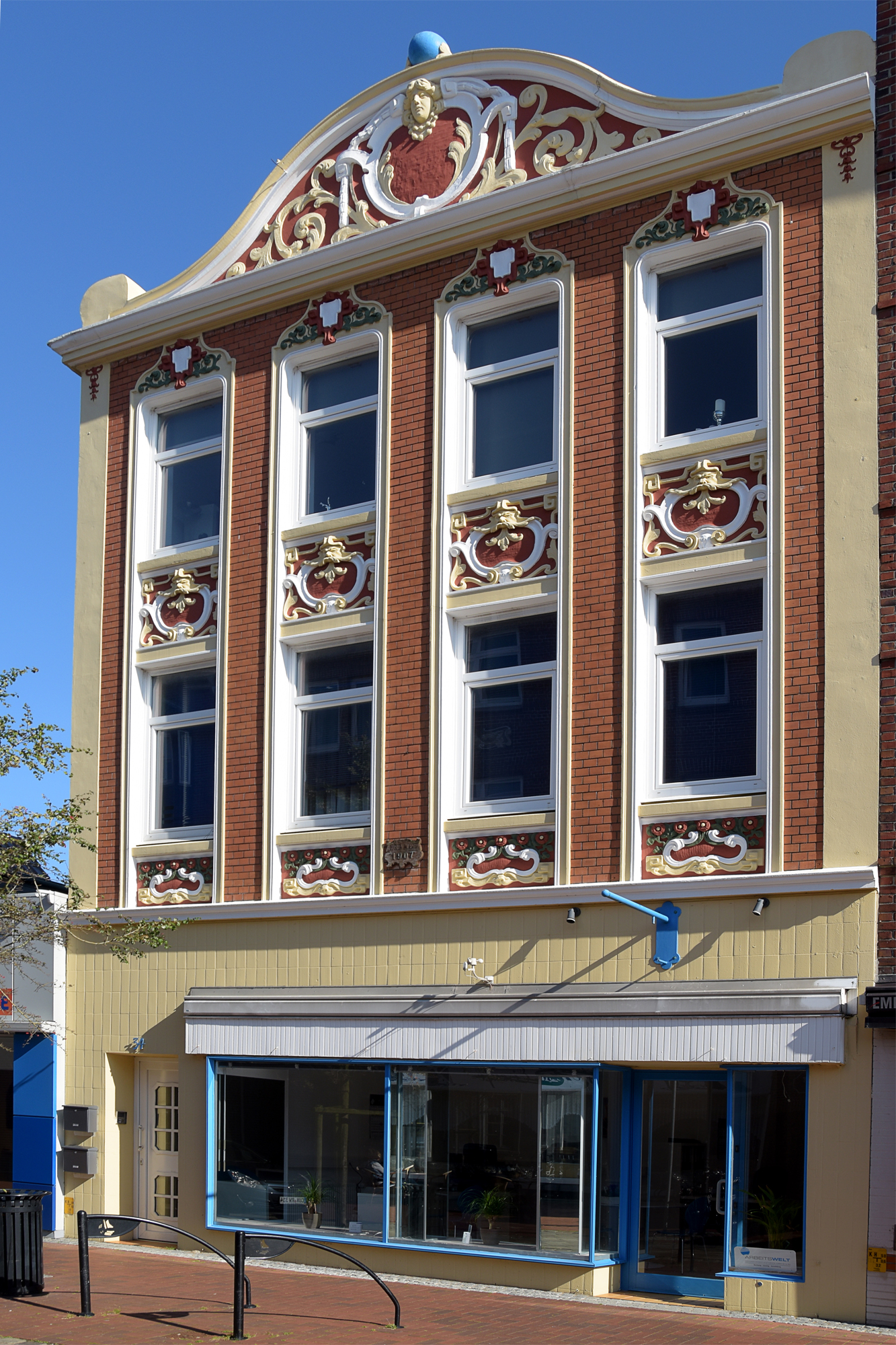 Denkmalgeschütztes Wohnhaus in Cuxhaven Schillerstraße 34